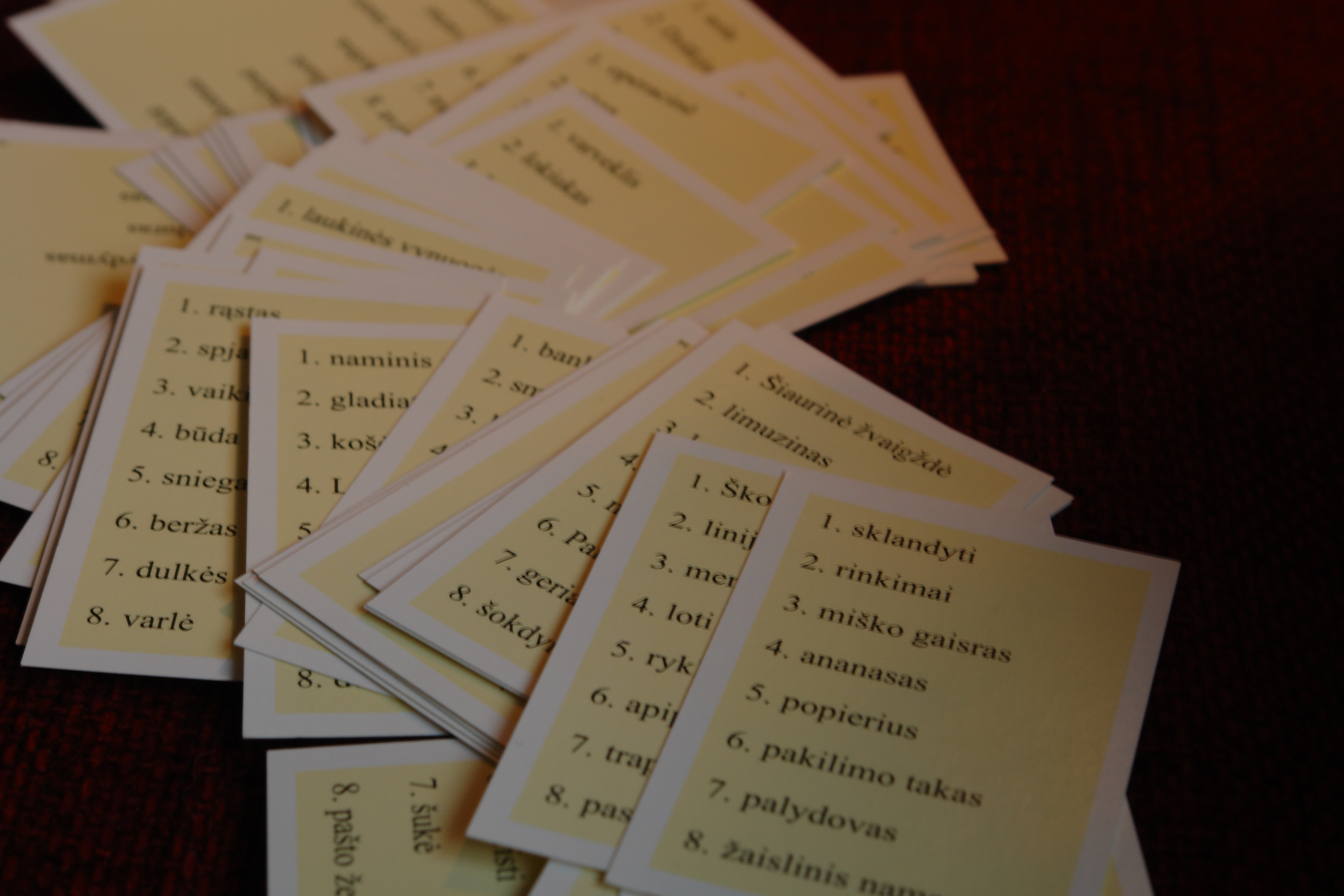 Žaidimo „Alias“ kortelės